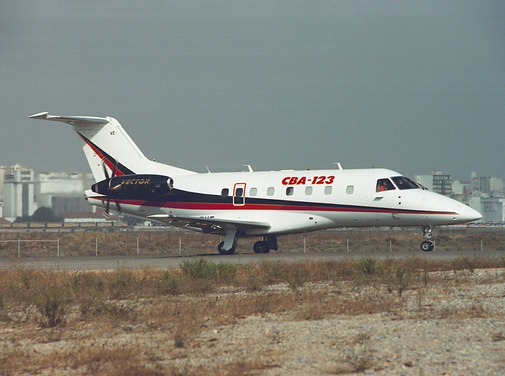 PT-ZVE (cn 123801)